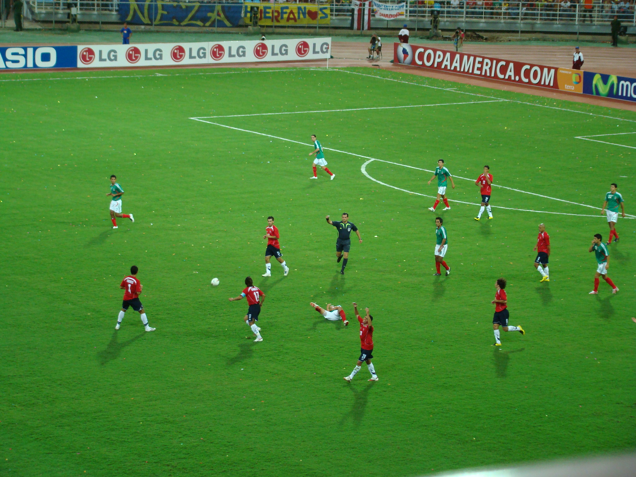 Partido innaugural de la copa América 2007, Venezuela.